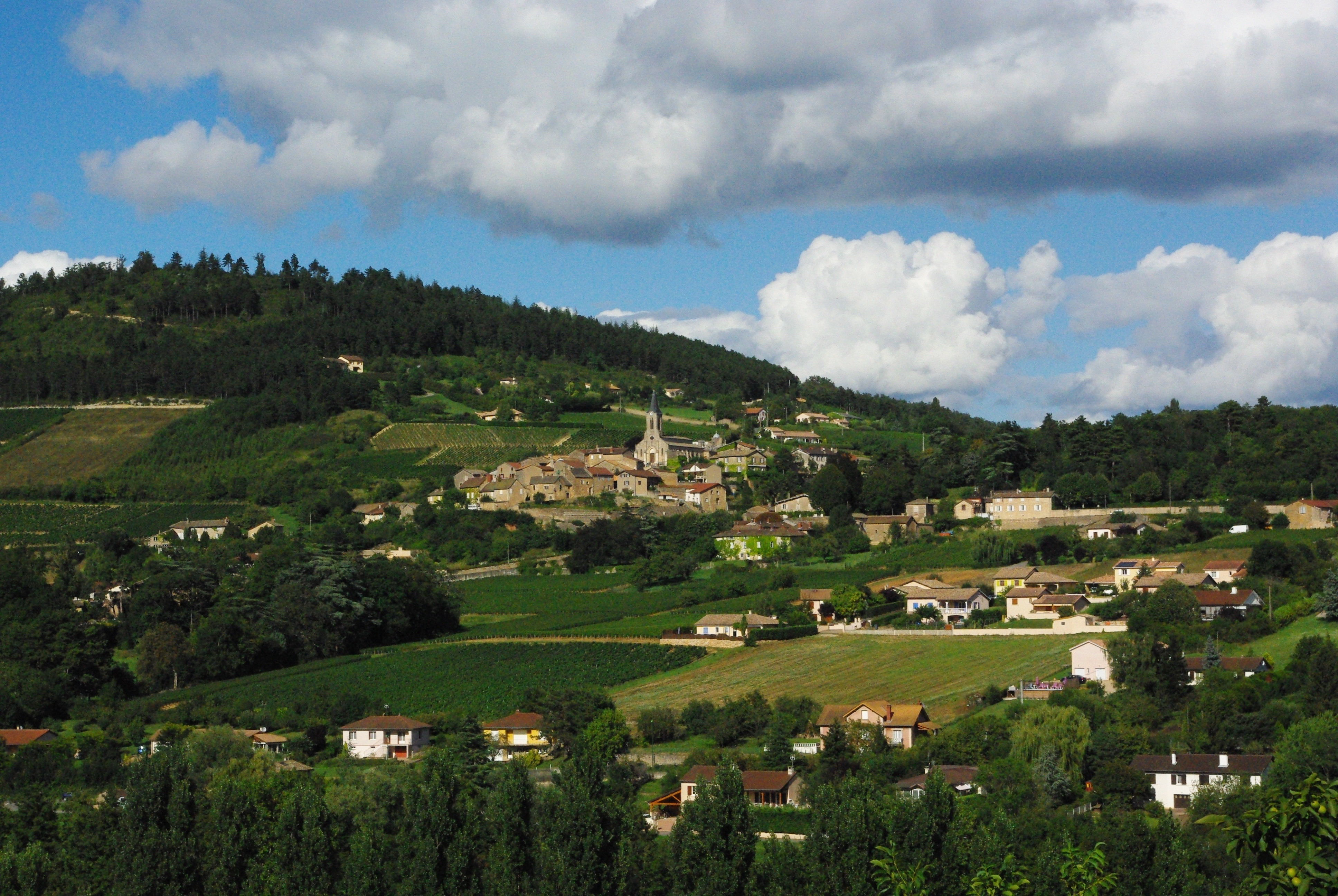 La Roche-Vineuse (71)